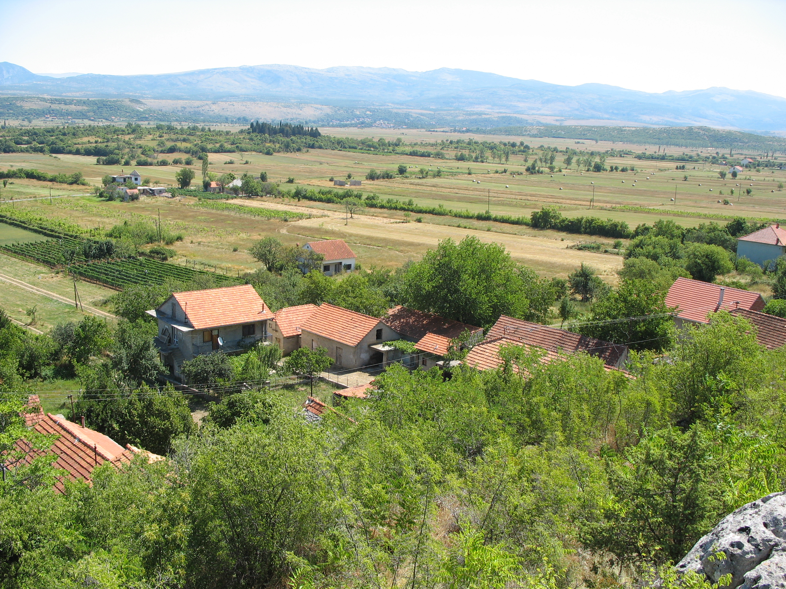 Kričke kod Drniša.